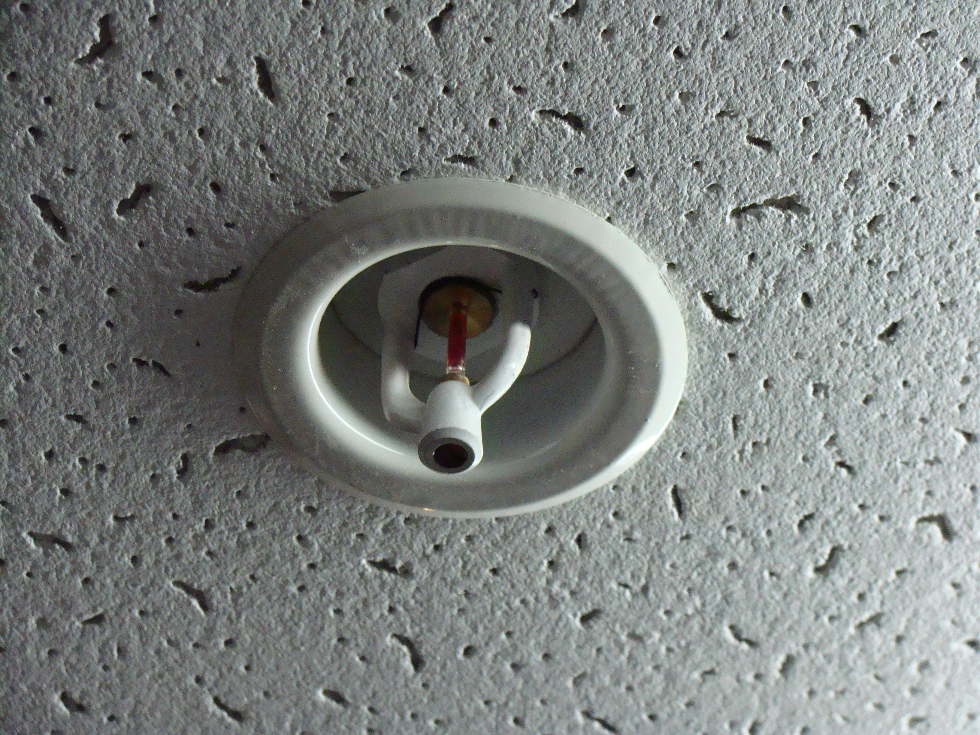 углубленный спринклерный ороситель